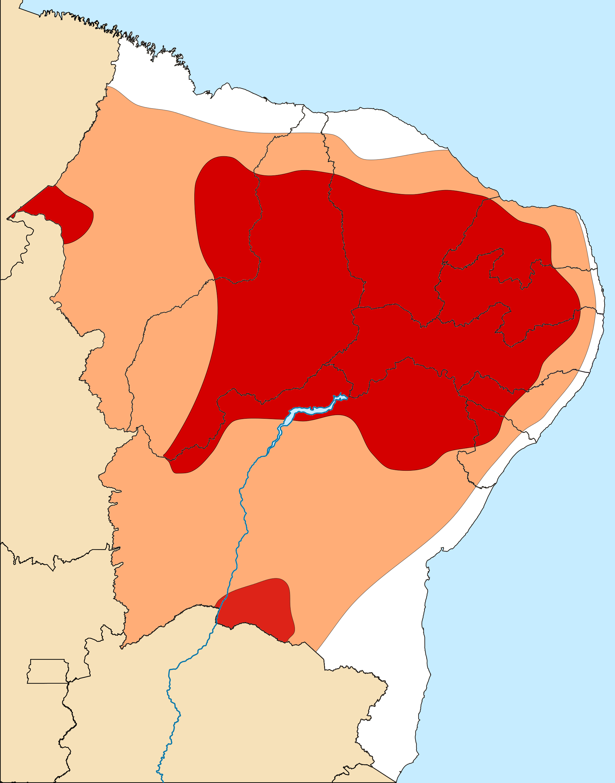 Mapa da situação de seca em Outubro/2016 Região Nordeste do Brasil.